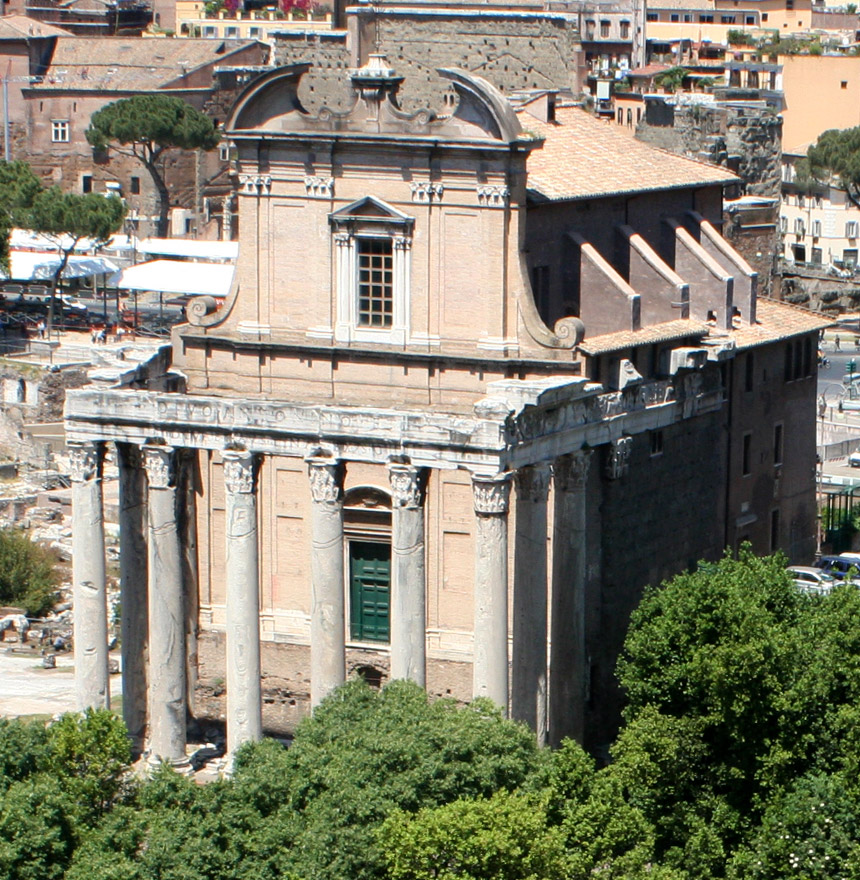 Templo de Antonino y Faustina en el Foro Romano